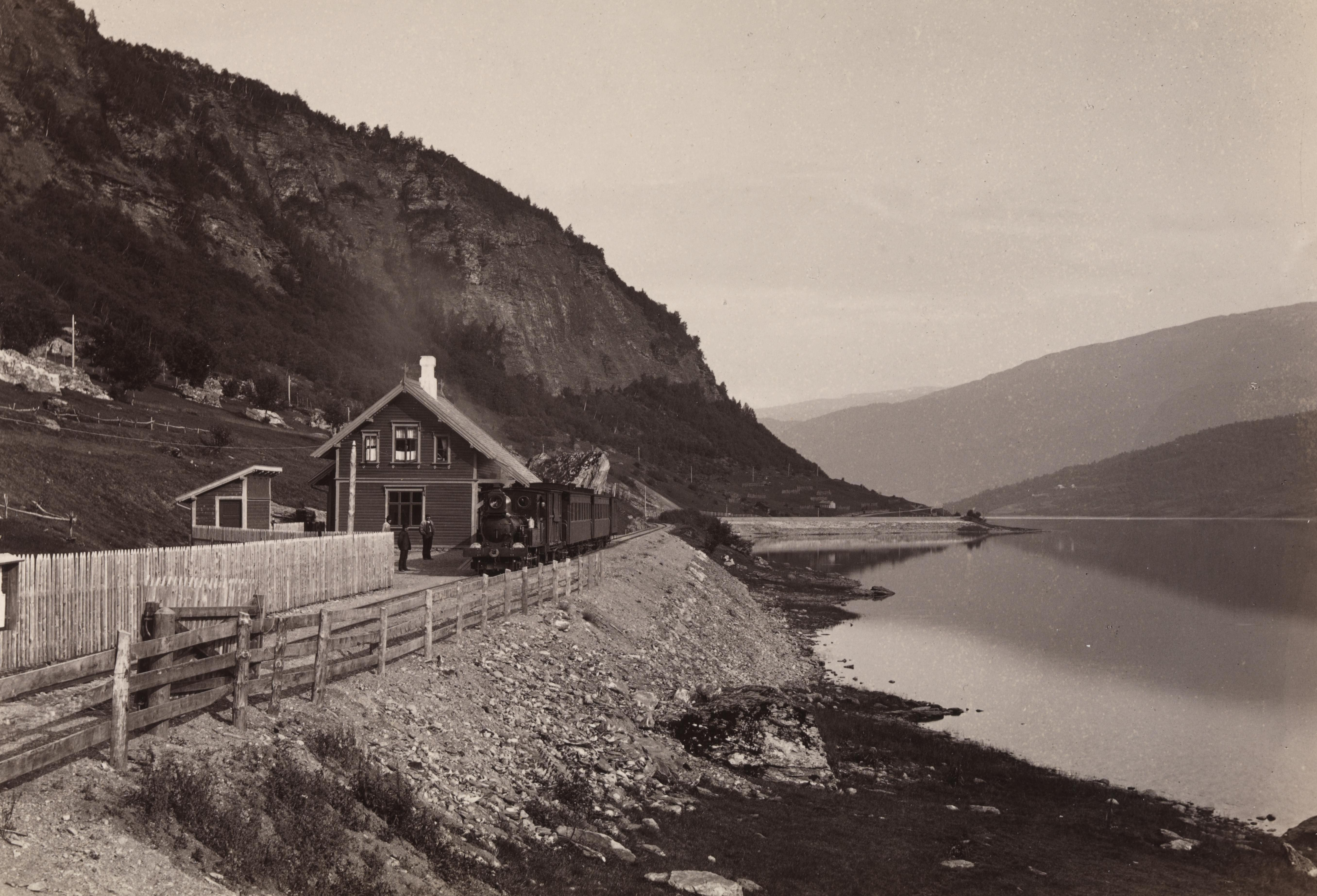 Bildet er hentet fra Nasjonalbibliotekets bildesamling Voss, Hordaland